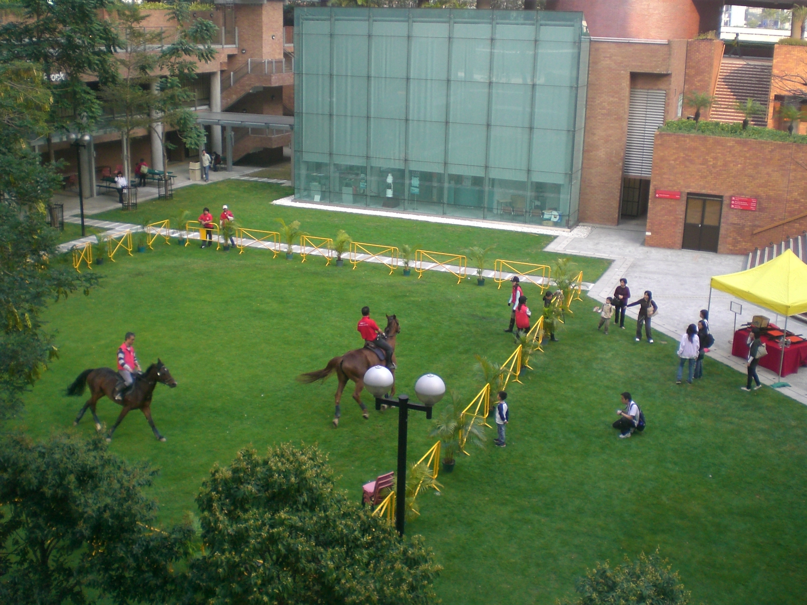 meadow, 香港理工大學校友會嘉年華2008年